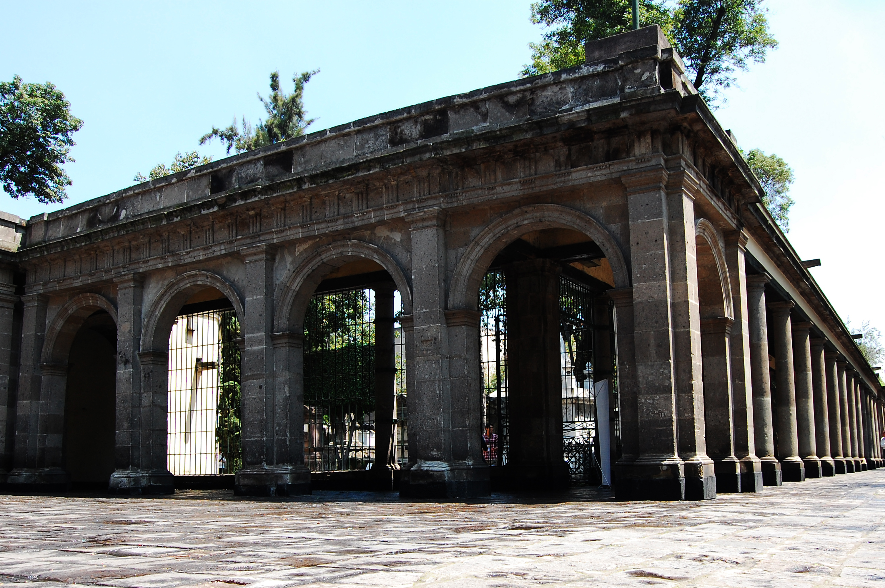 Panteón de los Hombres Ilustres